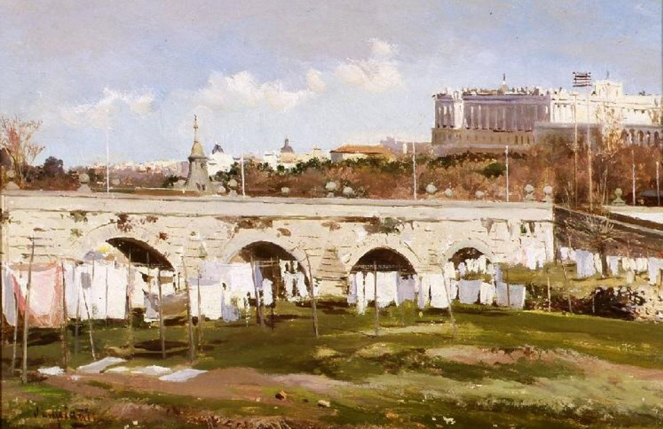 Lavaderos junto al Puente de Segovia, por José Lupiáñez y Carrasco. Óleo sobre tabla. 24 x 35 cm. Museo de Historia de Madrid. Trás el puente de Segovia, puede distinguirse el chapitel de la ermita de la Virgen del Puerto y al fondo el palacio Real.